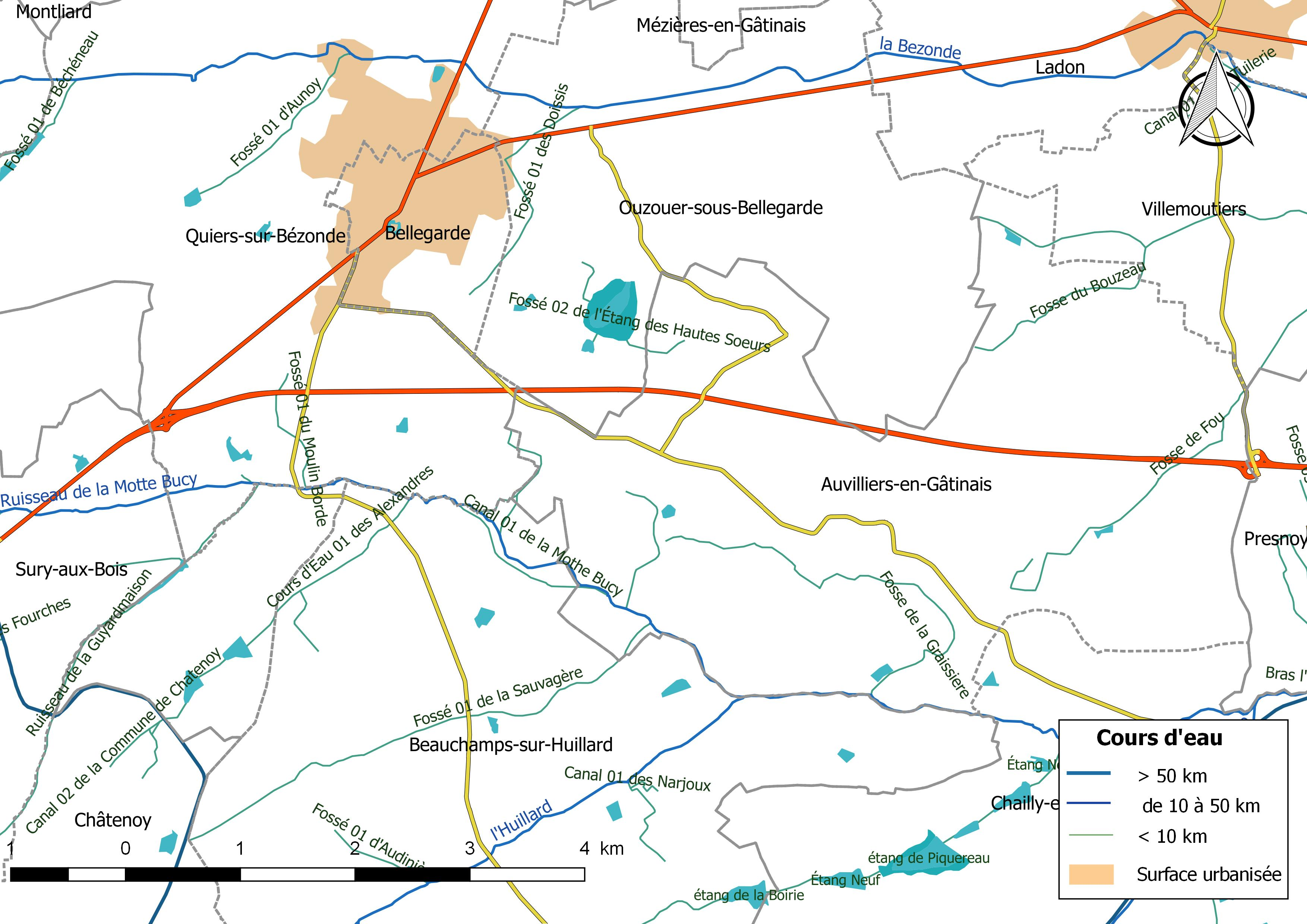 Carte du réseau hydrographique de la commune de Auvilliers-en-Gâtinais (France).